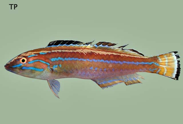 Sagittalarva inornata